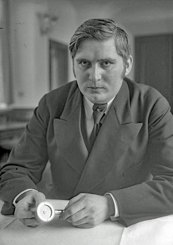 Elektrizität aus Sonnenlicht! Eine Epoche machende Entdeckung des deutschen Gelehrten Dr. Bruno Lange vom Kaiser Wilhelm-Institut in Dahlem. Dr. Lange ist es gelungen, mittels einer von ihm erfundenen Fotozelle die Energien der Sonne auf direktem Wege in elektrische Kräfte, ohne den Umweg über Kohle, Benzin oder Wasserkraft, zu verwandeln. Der 29 jährige Dr. Bruno Lange vom Kaiser Wilhelm-Institut in Dahlem, dem es gelang, Sonnenlicht in elektrische Kraft umzuwandeln. Vor ihm seine Epoche machende Erfindung, die Fotozelle, mit deren Hilfe seine Experimente ausgeführt werden.